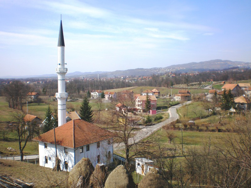 Panorama naselja Mahala